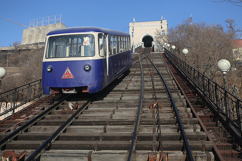 Вагон Владивостокского фуникулёра в середине линии